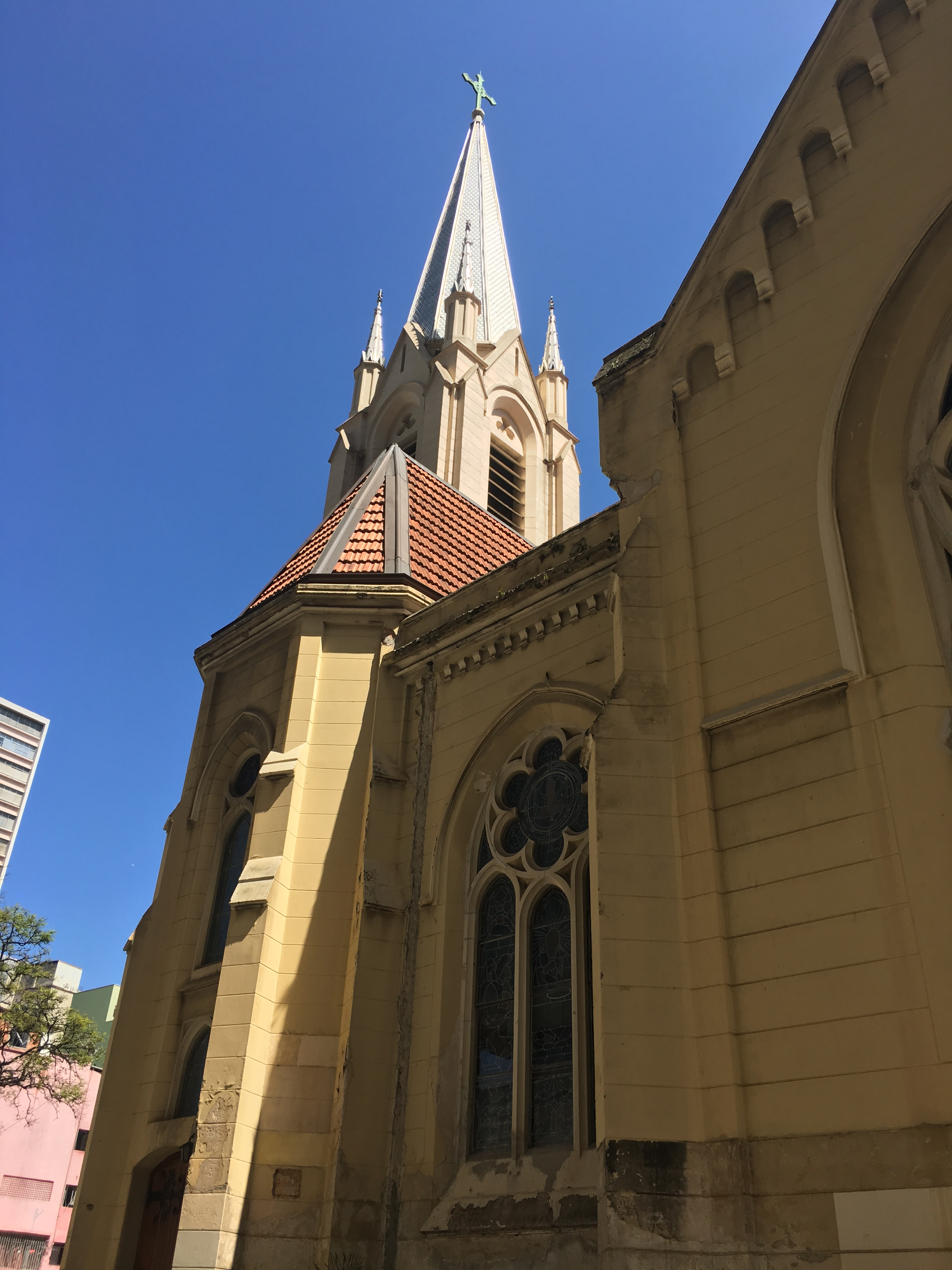 Visão posterior da torre frontal da Igreja Luterana Martin Luther, no Largo do Paissandu (São Paulo-SP, Brasil).